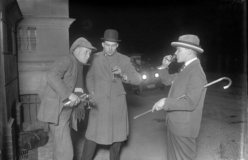 Mit Kamera und Blitzlicht durch die nächtliche Großstadt Berlin! Die nächtliche Großstadt bietet dem Foto-Reporter vielerlei Objekte für seine Kamera. Wenn nach Mitternacht die Polizeistunde eingetreten ist, entwickelt sich in den Strassen der Großstadt das Nachtleben. Unsere Existenzen, wie Kokain-, Likör- und Zigarettenverkäufer und Falschspieler, suchen ihre Opfer, in ständiger Flucht vor der Polizei. "Schnaps-Ede" der fliegende Likör-Verkäufer nach der Polizeistunde auf der Strasse. Seine "Conzession" ist nicht genehmigt und der Likör, welcher pro Glas eine Mark kostet, ist oft recht zweifelhafter Herkunft. Der Verkäufer wechselt ständig seinen Standort.